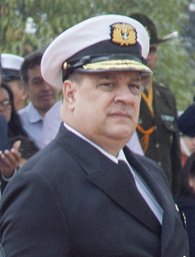 Almirante Leonardo Santamaría Gaitán en Ceremonia del Día Nacional de la Memoria y Solidaridad con las Víctimas